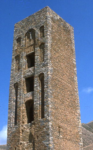 Kalâa des Béni Hammad, Algérie